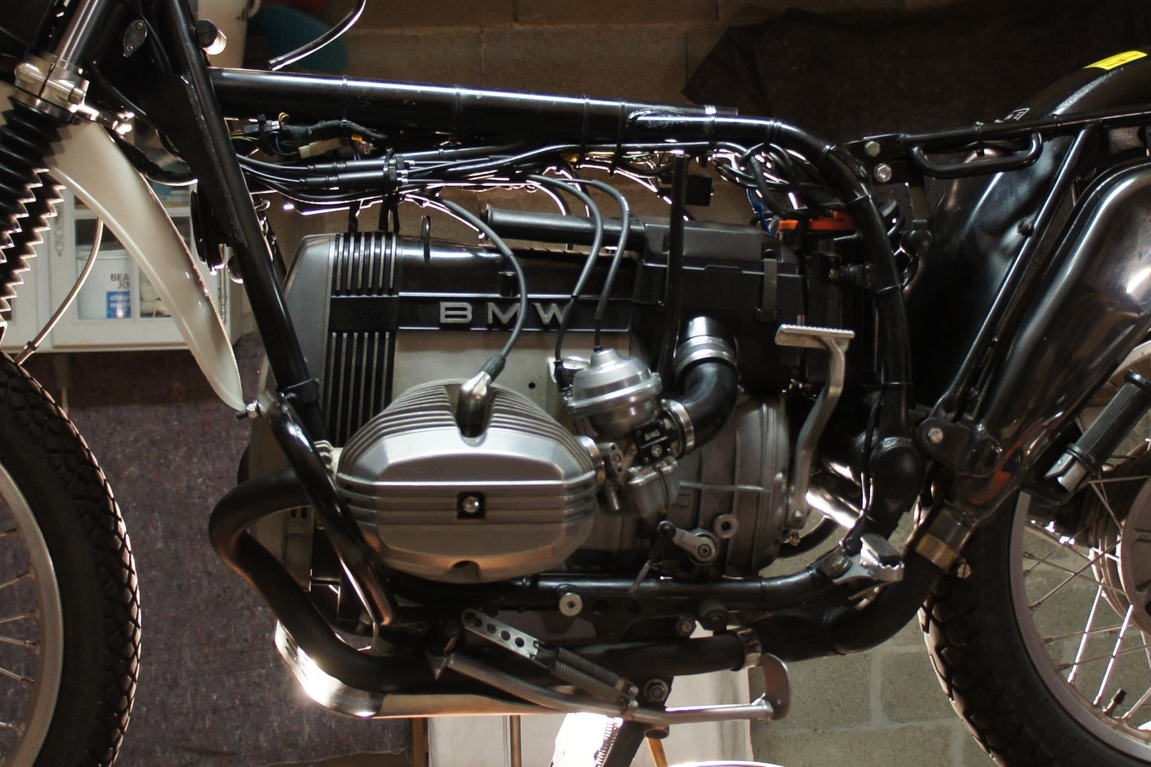 Moteur Flat Twin BMW R80G/S